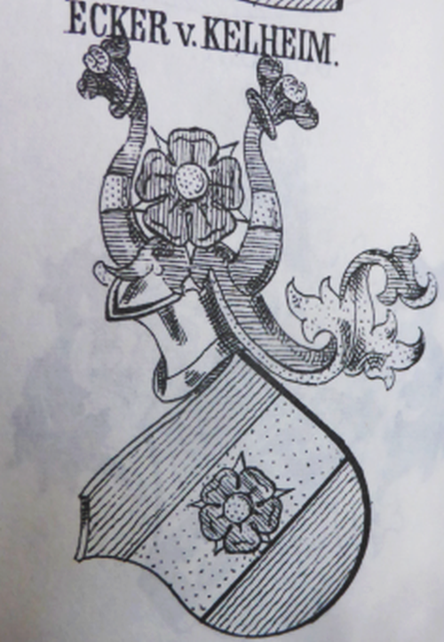 Stammwappen der Eck(er) von Kelheim